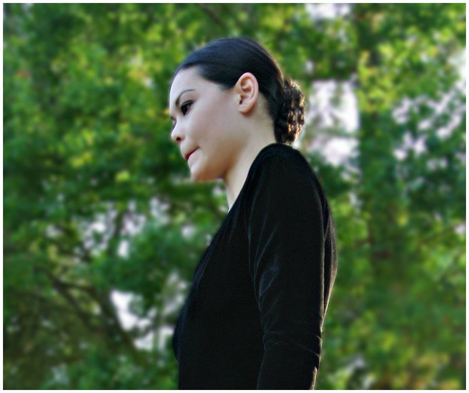 Alice Renavand - Festival "Un Violon sur le Sable" 2014, Royan